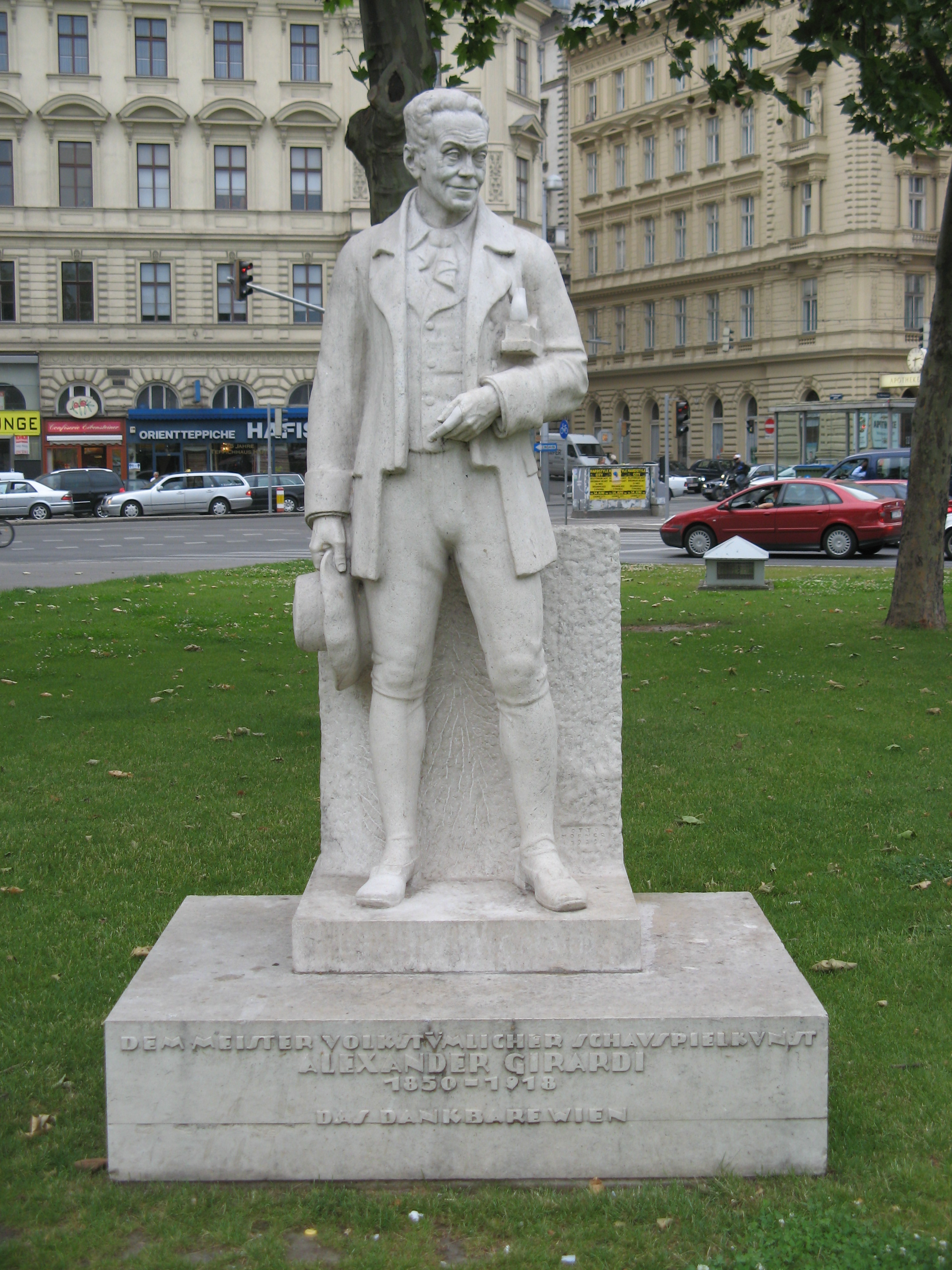 Denkmal für Alexander Girardi (1929) von Otto Hofner, Girardipark, Wien